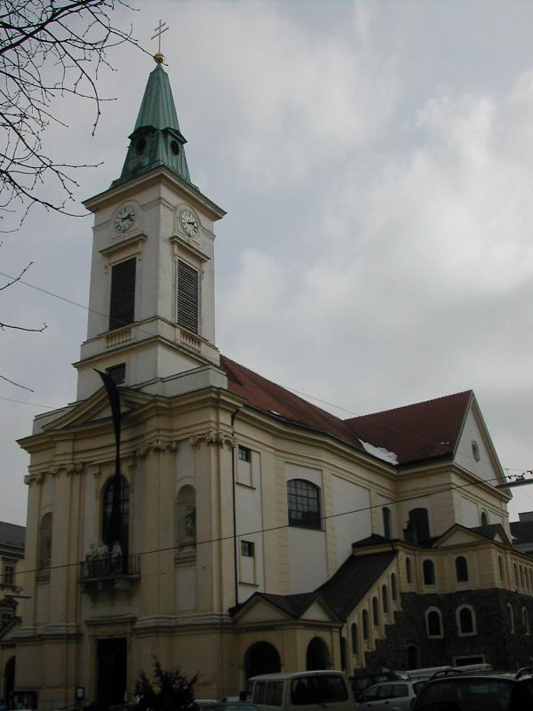 Kalvarienbergkirche, Hernals